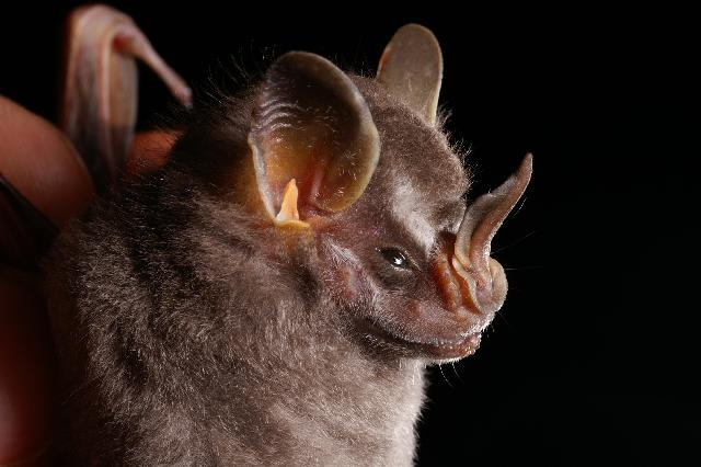 Artibeus phaeotis